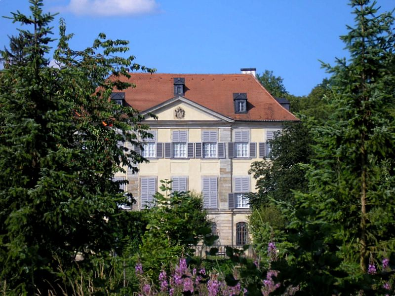 Schloss Birkenfeld (Landkreis Haßberge, Unterfranken) / Birkenfeld Castle, Lower Franconia, Germany. Hauptbau von Süden / View from the south. Eigene Aufnahme, Juni 2006 / Own photo, June 2006